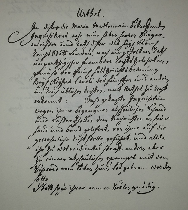 Todesurteil von 1730 gegen Maria Madlener wegen angeblicher Hexerei. Quelle: Stadtarchiv Lindau, A III 57,7 (Reichsstädtische Akten)